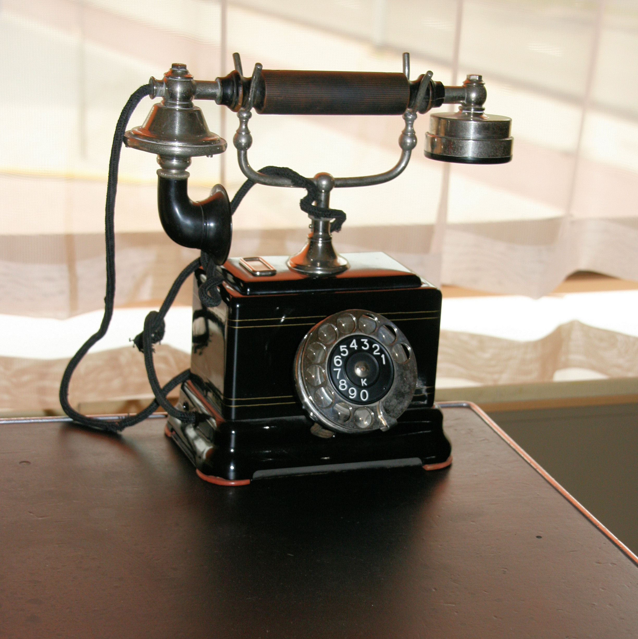 Titel: Telefoon Ericsson Jaar: Onbekend Ontwerper: PTT / NORM 51 Omschrijving: Zwart gelakt metalen toestel, tafelmodel met kunststof draaischijf. Collectie: NAi Objectnummer: 210 NAI Huis Sonneveld - Telefoon Ericsson PTT NORM 51